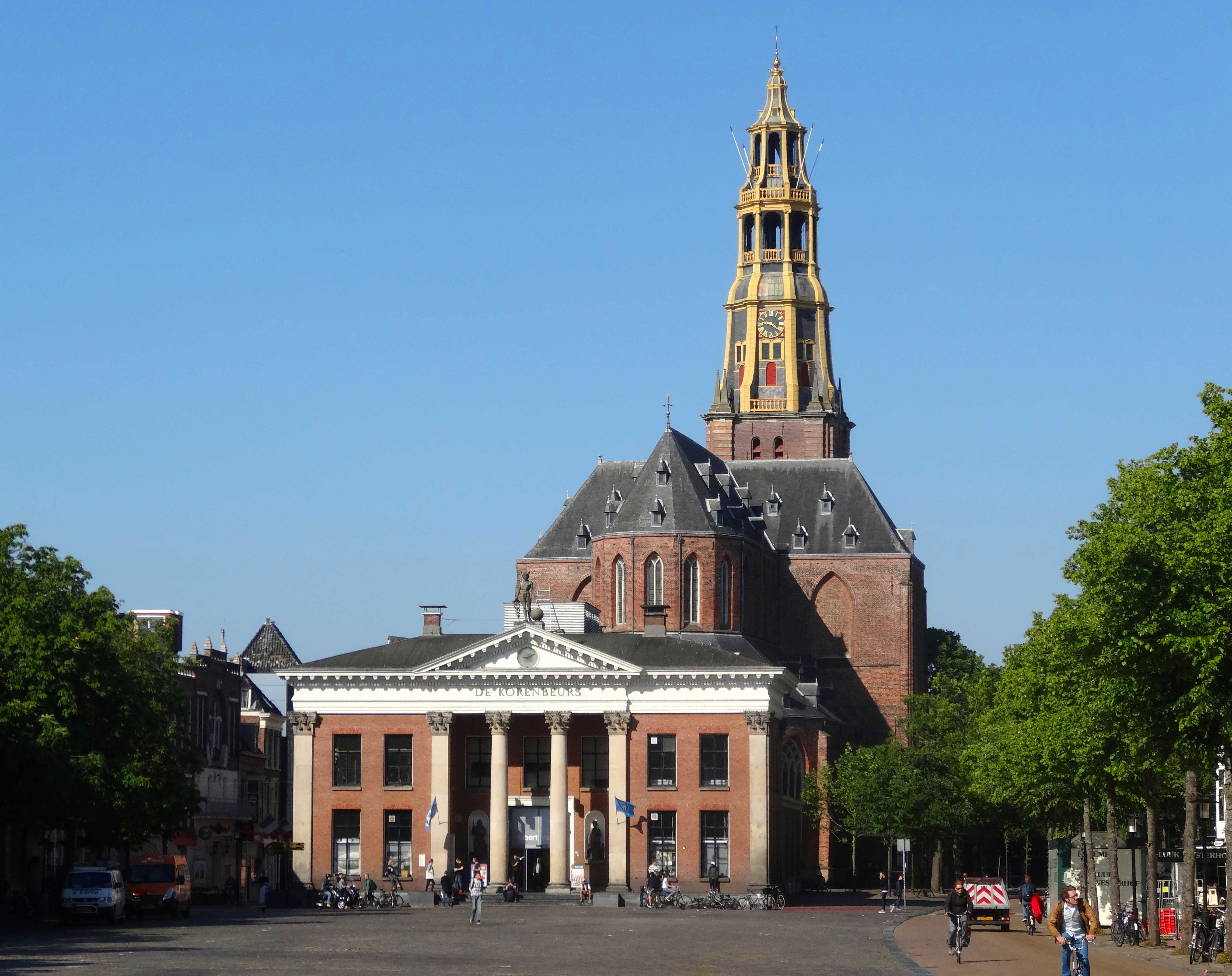 Vismerkt met Korenbeurs en Der Aakerk in Groningen